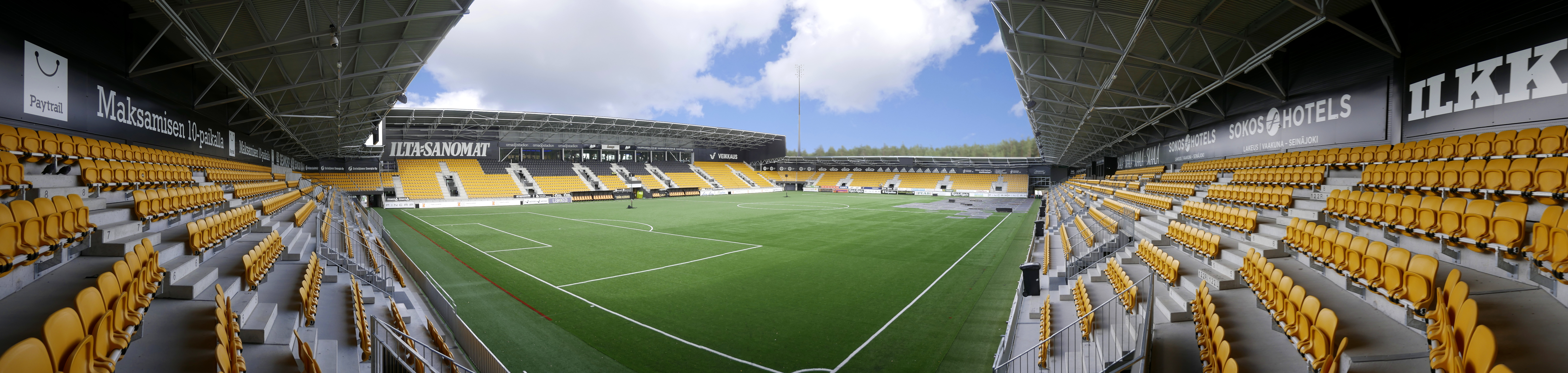 Seinäjoen OmaSp Stadion panoraamakuvassa.